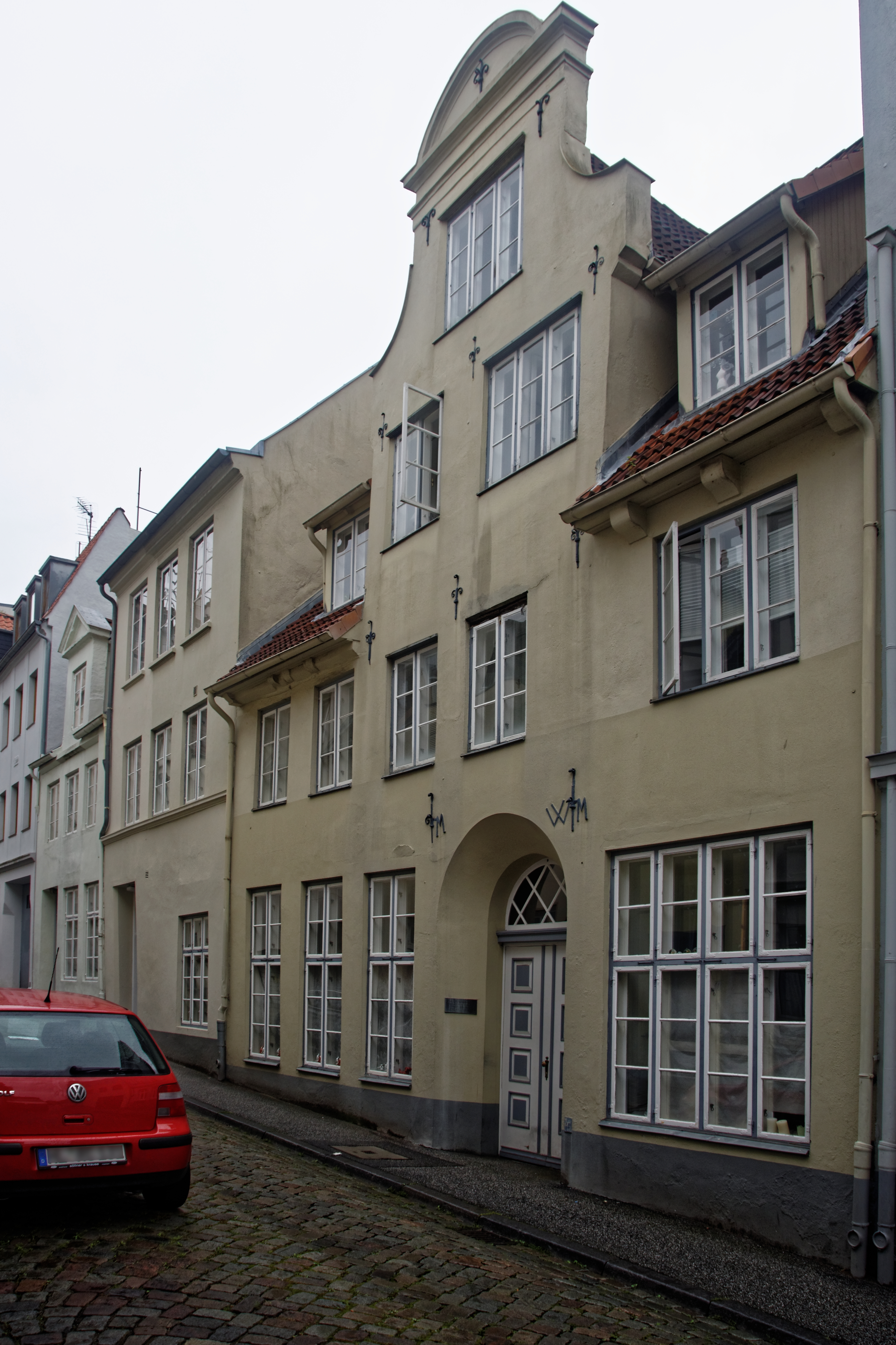 Lübeckstadter Alt, Kleine Gröpelgrube 11